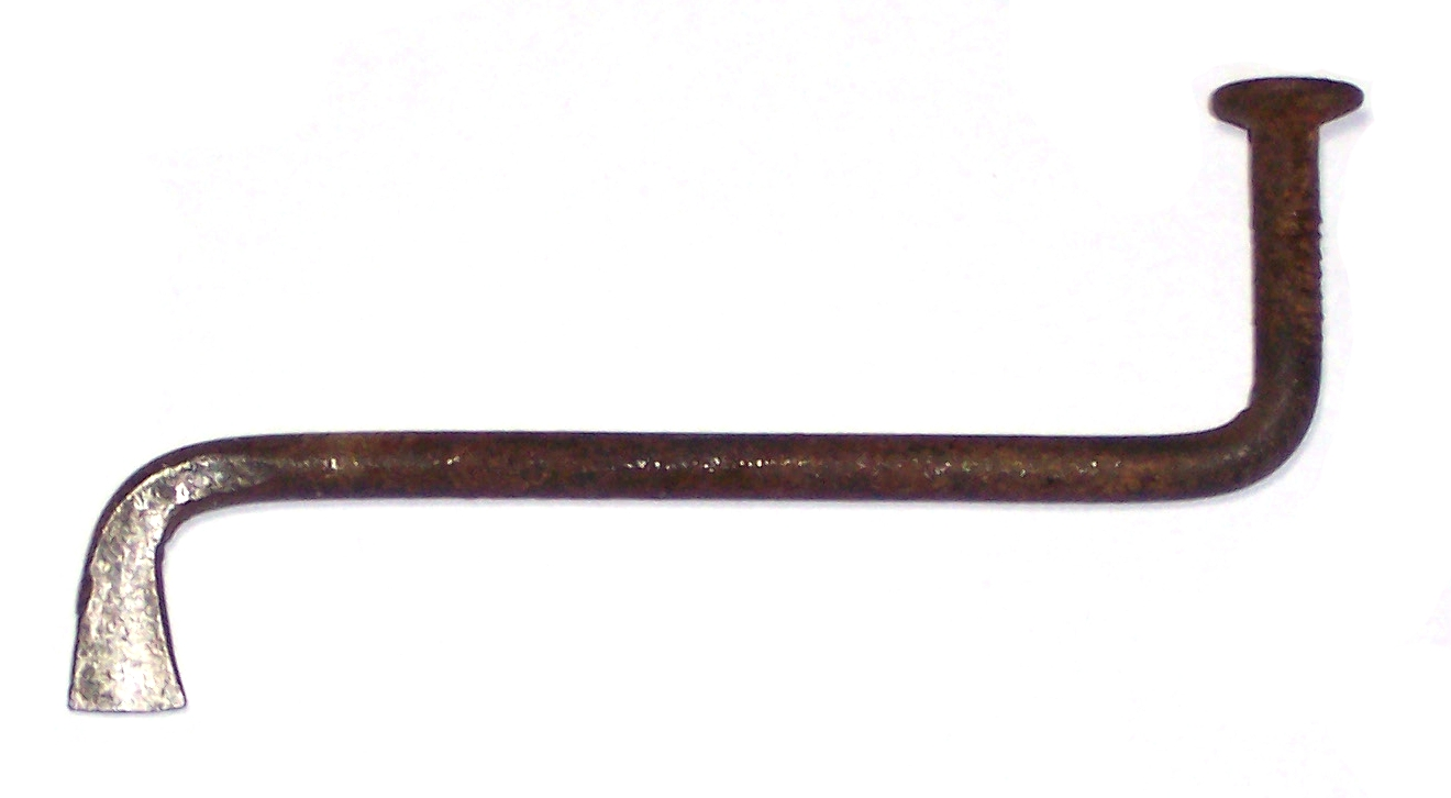 Ein einfacher Dietrich, aus einem Nagel selbst hergestellt.